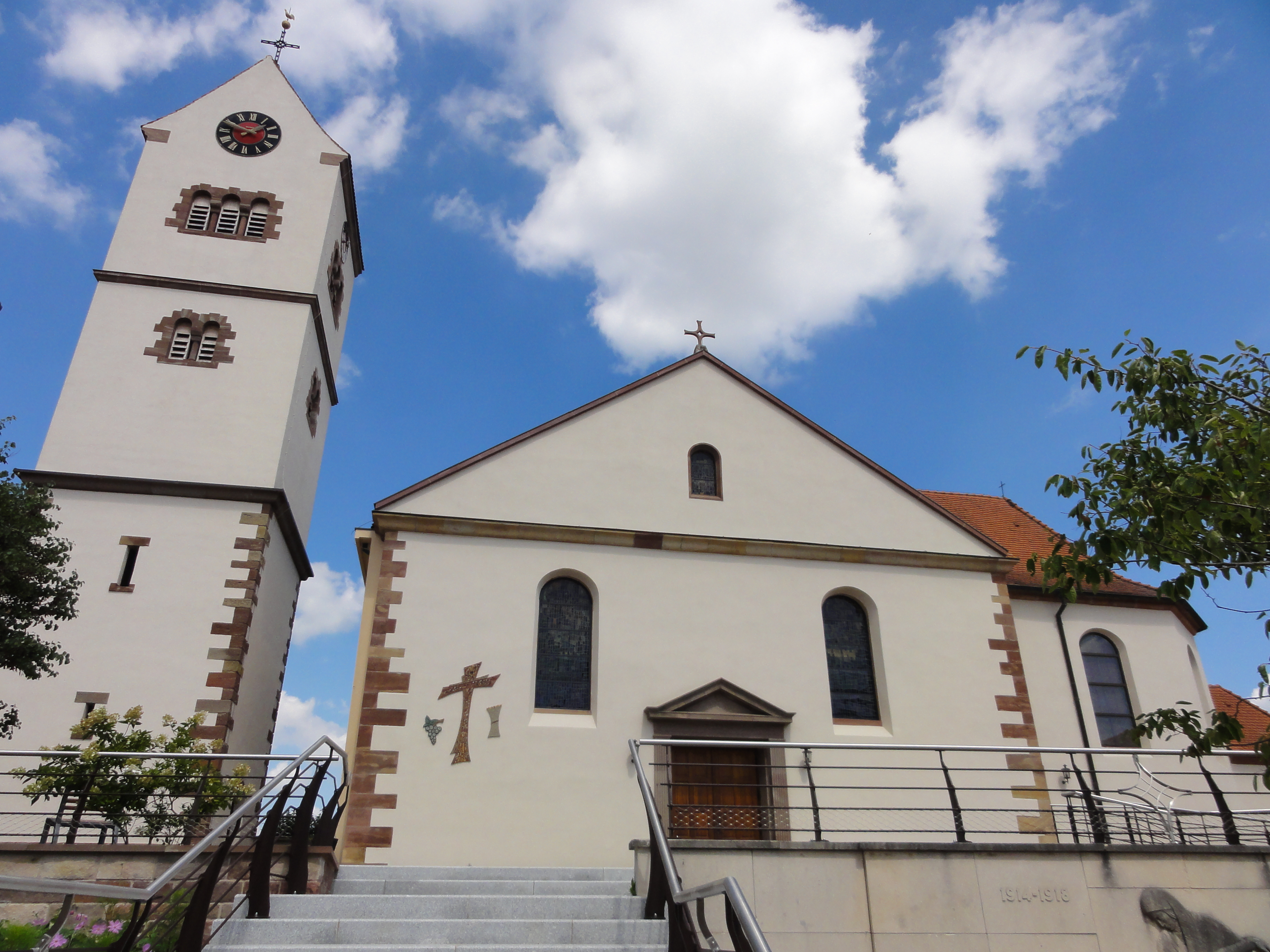 Alsace, Bas-Rhin, Truchtersheim, Église Saints-Pierre-et-Paul (IA67000997).